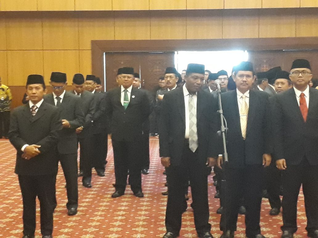 Proses pelantikan